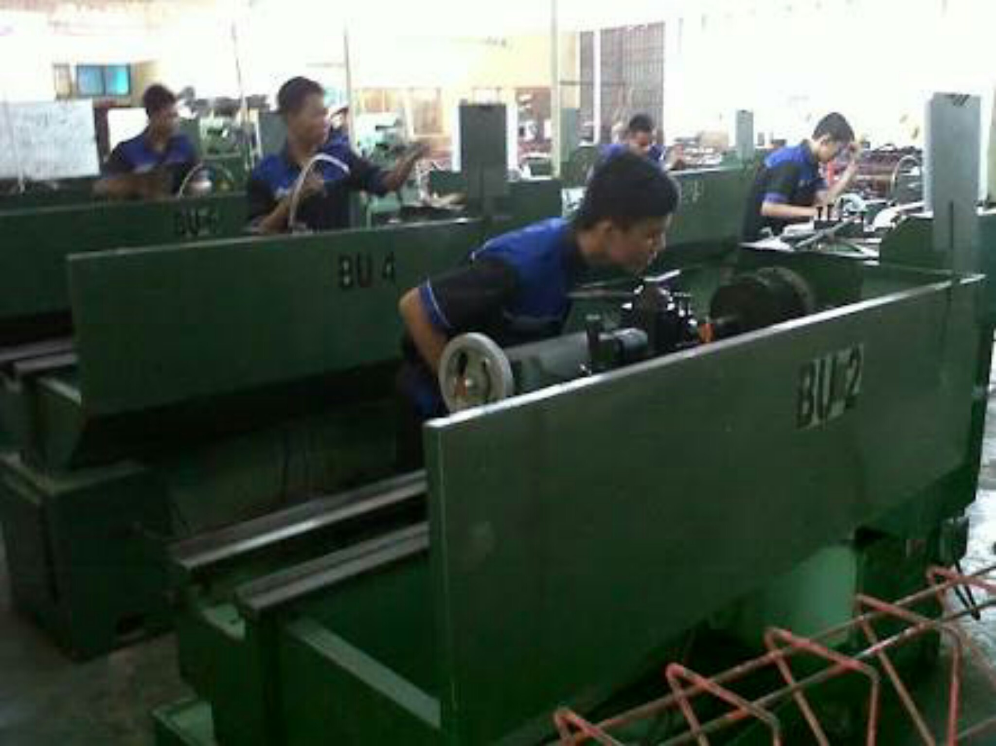 Pemesinan SMK Negeri 1 Cikampek